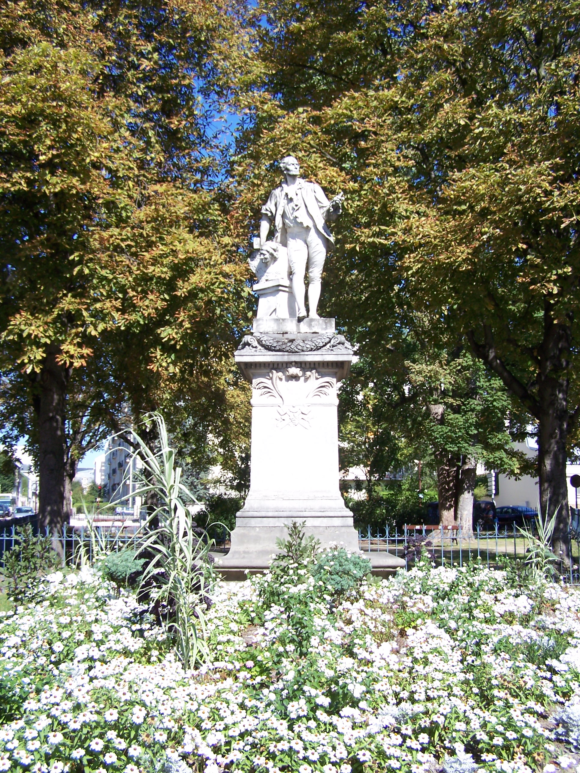 Tony Noêl (1845-1909), Monument à Jean-Antoine Houdon, 1891, Versailles (Yvelines, France).